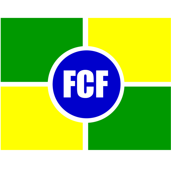 Logo (obsolete): Federação Cearense de Futebol, Fortaleza (CE), Brazil.